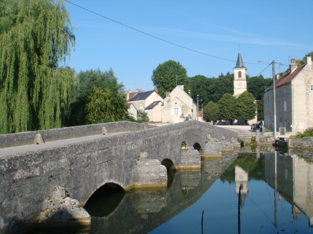 Pont Sully sur la Seine à Chamesson - centre bourg - RD 21D.